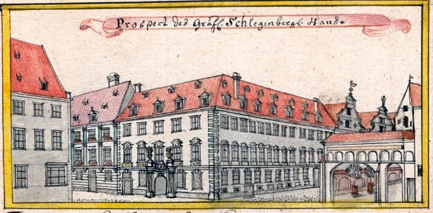 Pałac Schlegenbergów we Wrocławiu przy ulicy Wita Stwosza 12 Rysunek F.b. Wernera z 1755